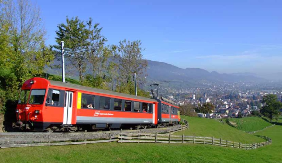 Pendelzug der Appenzeller Bahnen mit Steuerwagen ABt und Triebwagen BDeh 4/4 auf dem Zahnstangenabschnitt oberhalb von Altstätten SG unterwegs in Richtung Gais.